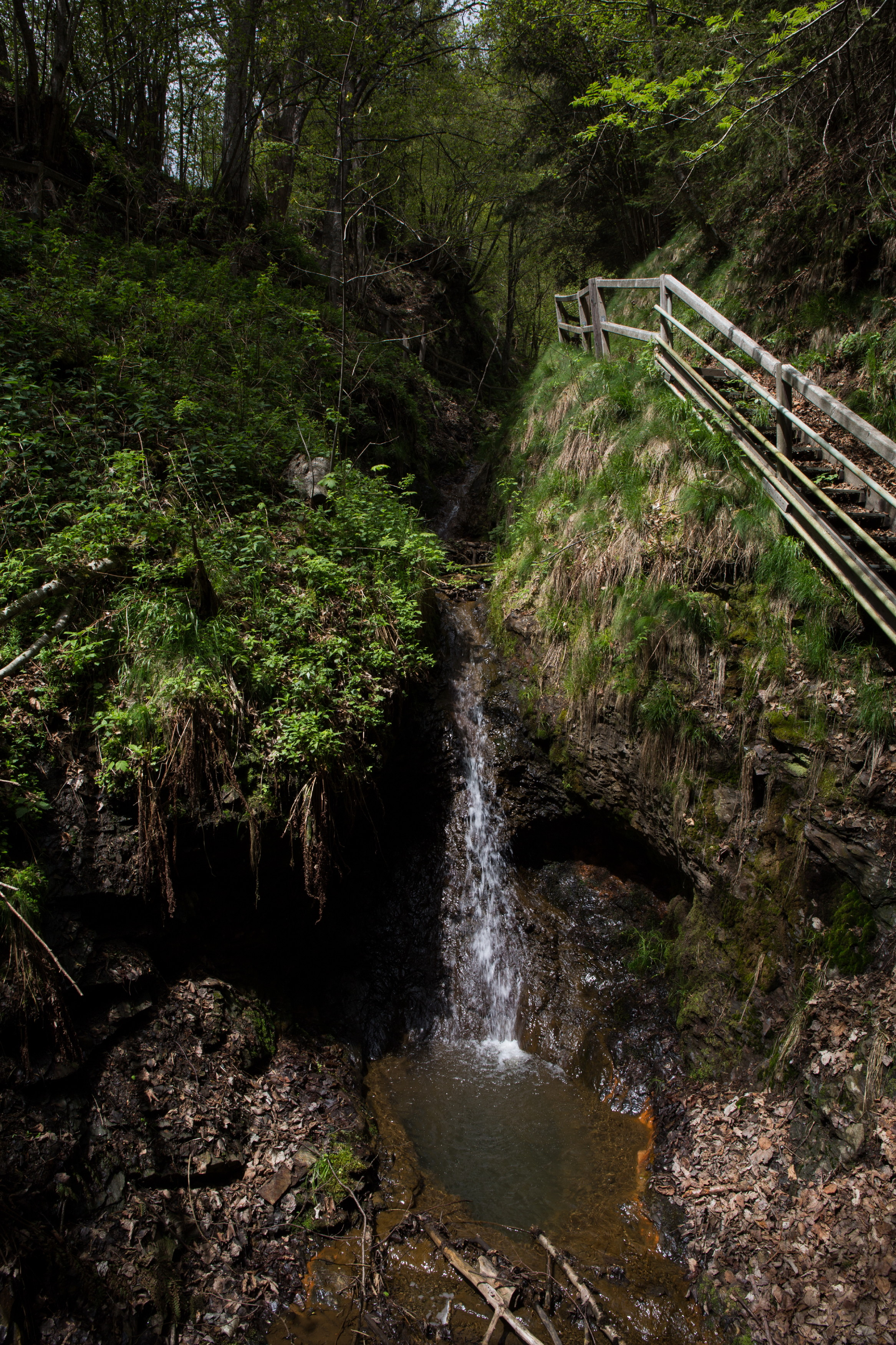 Klamm St.Lambrecht This media shows the natural monument in Styria with the ID 1052.